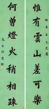 許應騤贈友人書